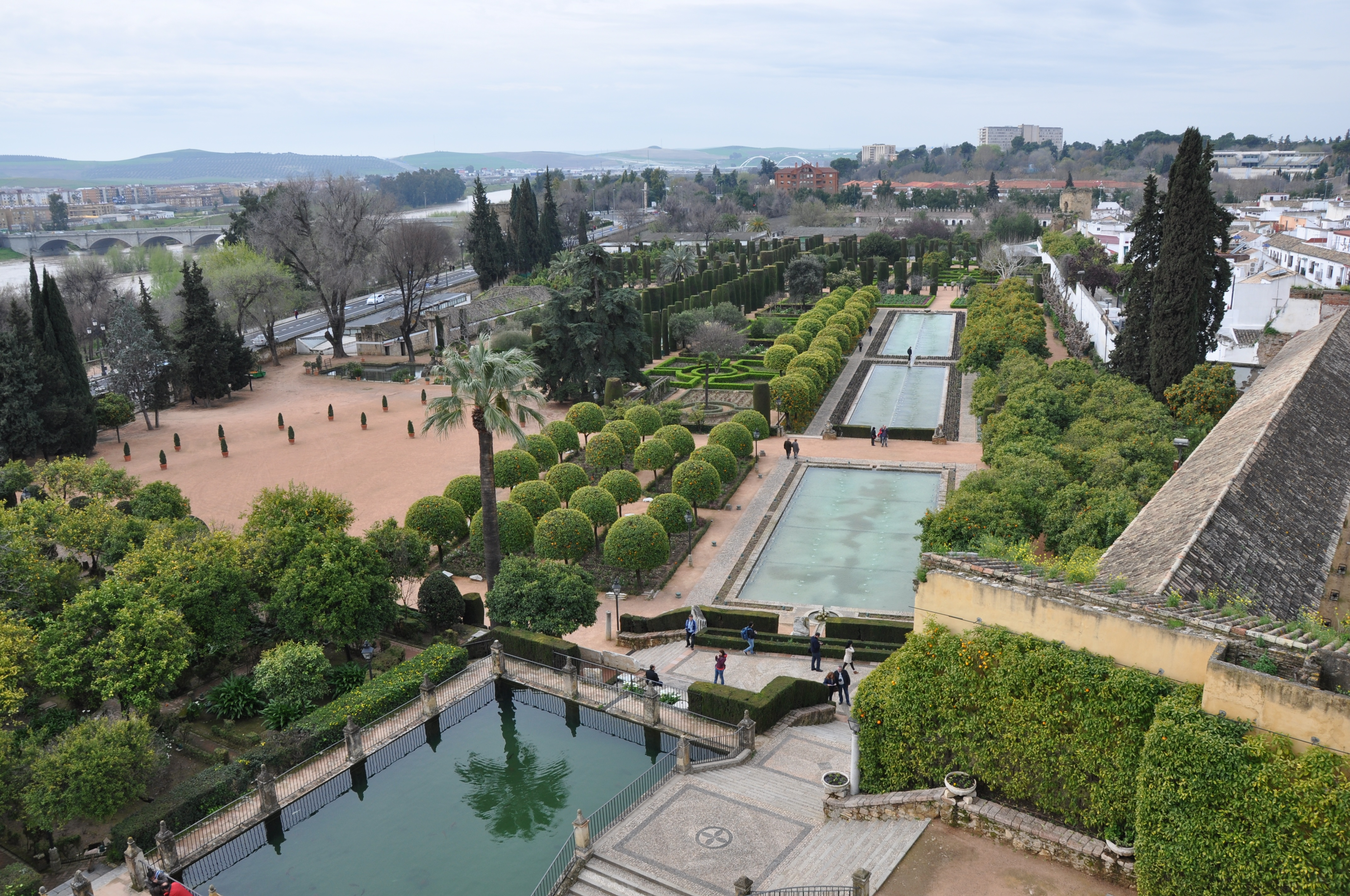 Jardines del Alcázar de los Reyes Cristianos, Córdoba (España).